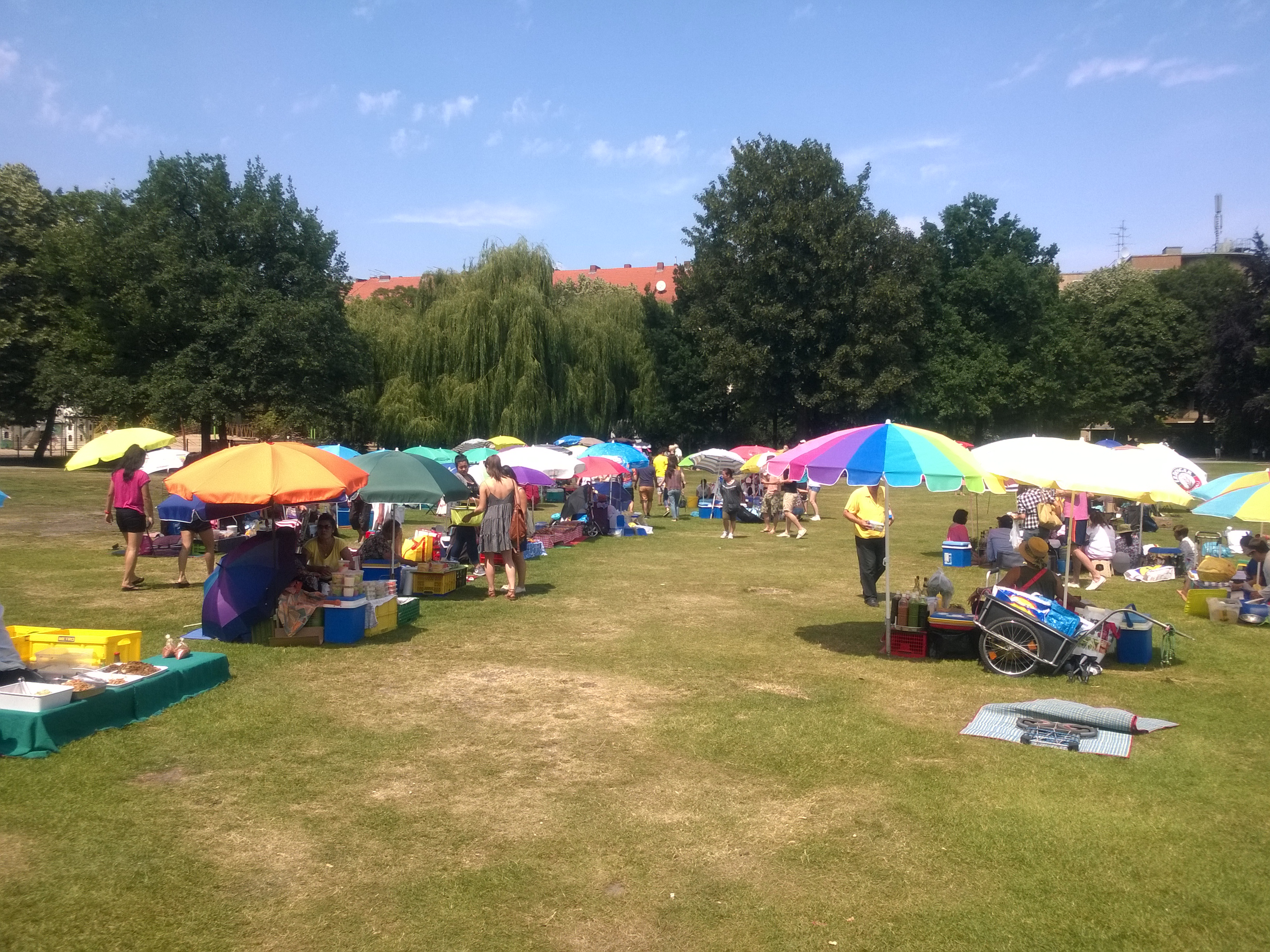 Berlin-Wilmersdorf Preußenpark asiatisches Picknick